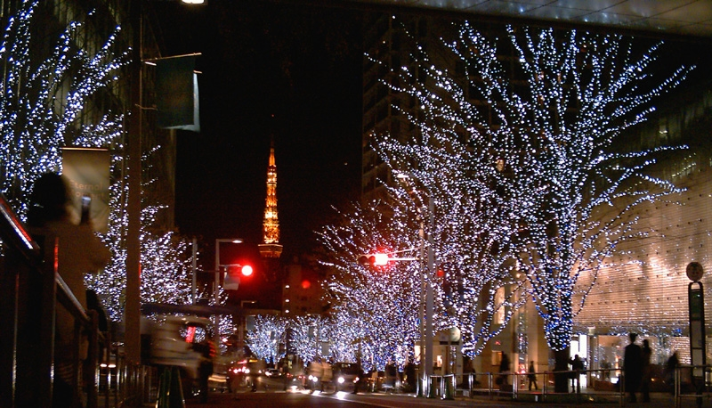 ARTELLIGENT_CHRISTMAS_Roppngi_Hills Tokyo Japan